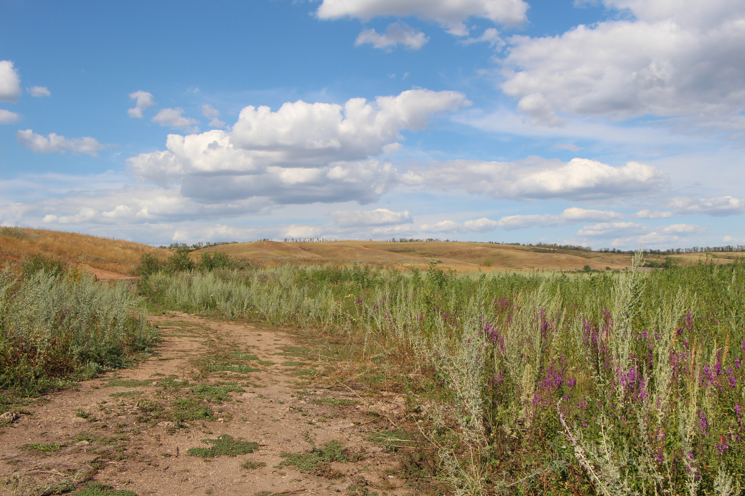 Чубовская степь, Кинельский район This image is related to the protected area of Russia number 6310430